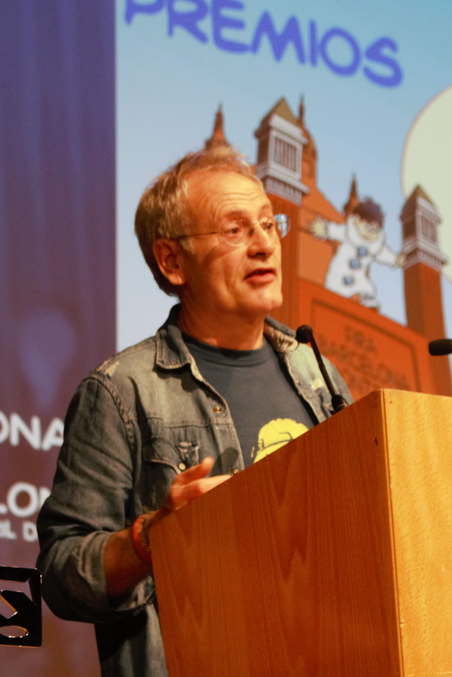 L'autor de còmic Ángel de la Calle fent un discurs després d'haver obtingut el premi a la millor obra per "Pinturas de guerra". Saló Internacional del Còmic de Barcelona, 2018.